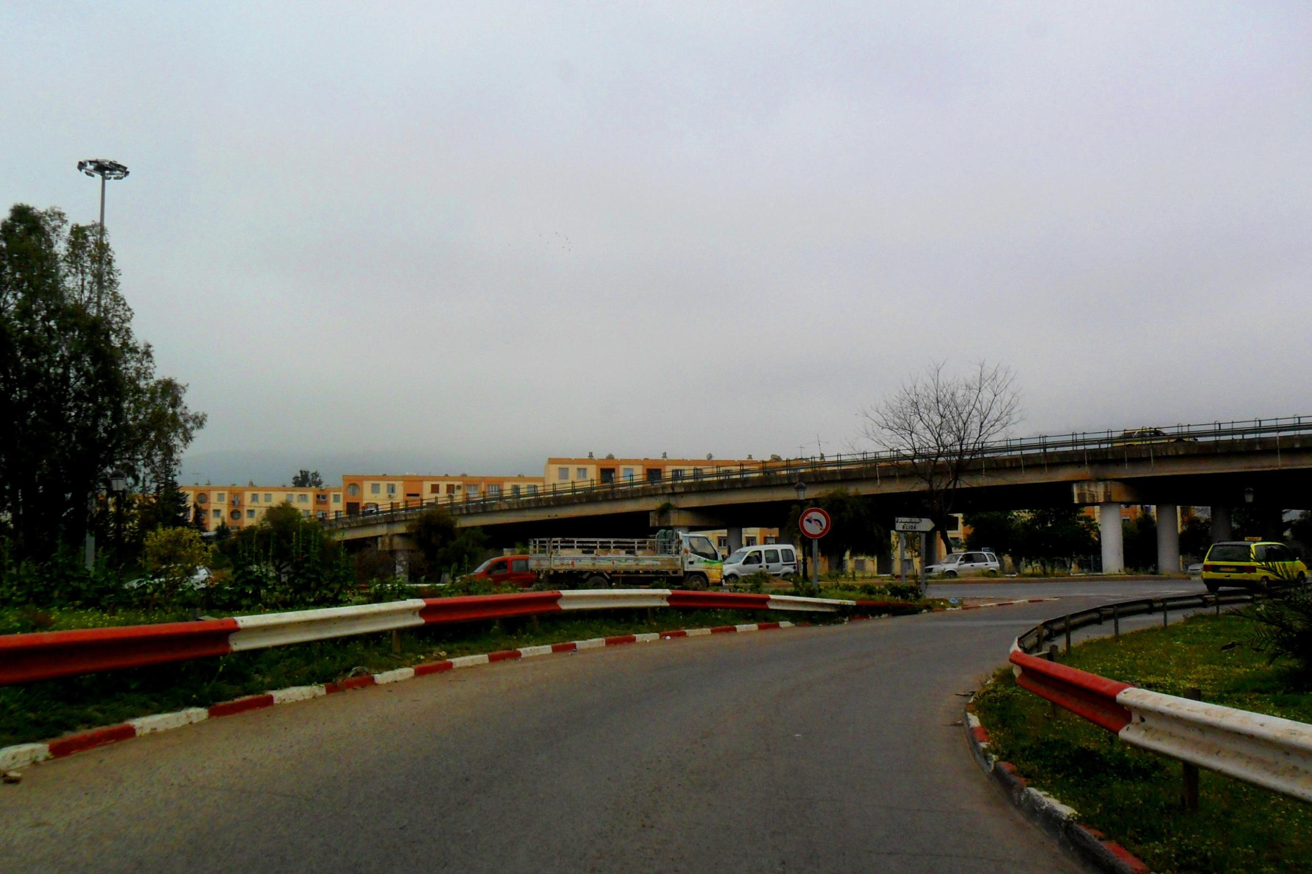 Ouled Yaïch اولاد يعيش